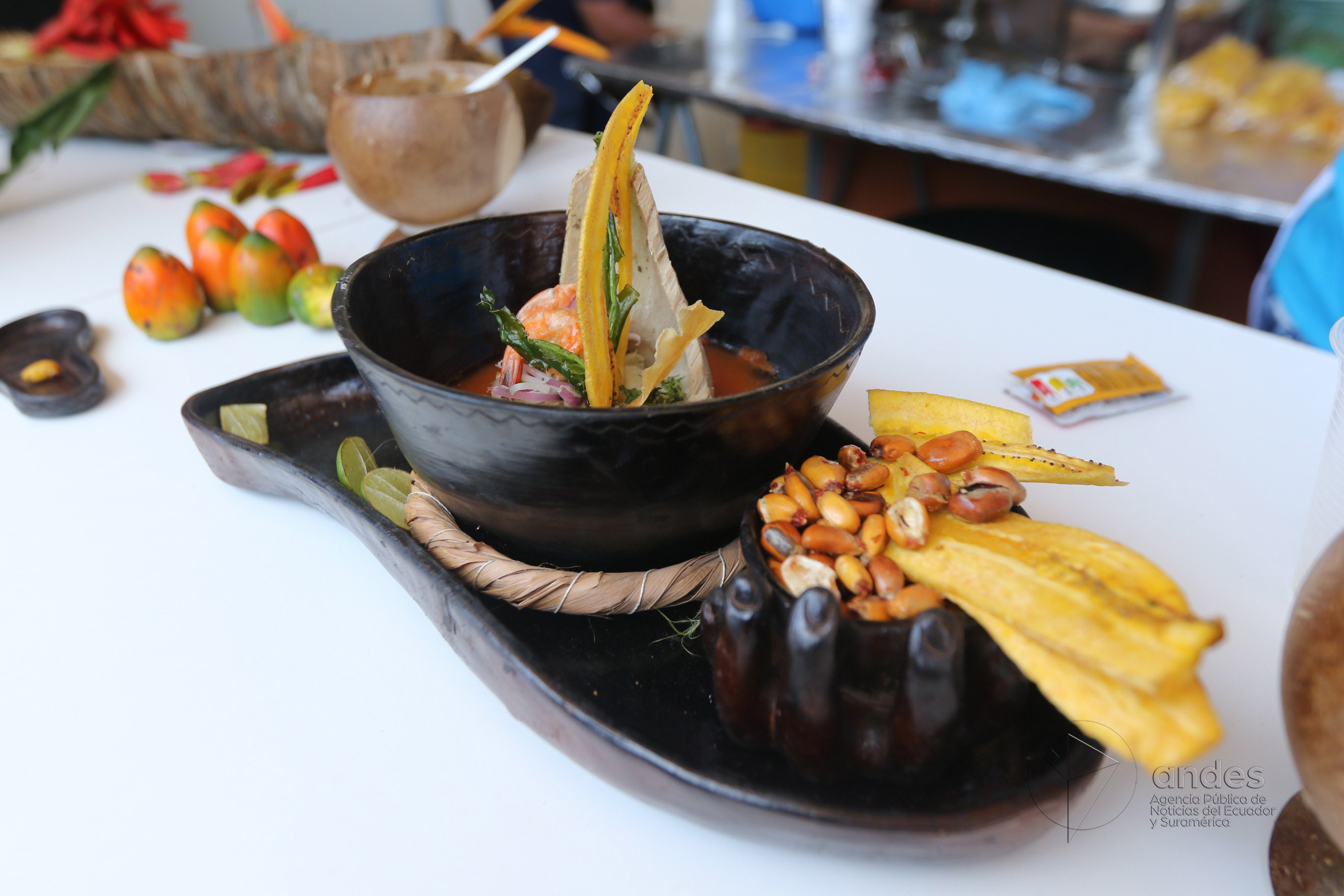 Esmeraldas, Esmeraldas 19 Mar (Andes).-El Mundial del encebollado se celebró en la playa Las Palmas con la presencia del presidente de la República Rafael Correa. Fotografías: Carlos Rodríguez/Andes.